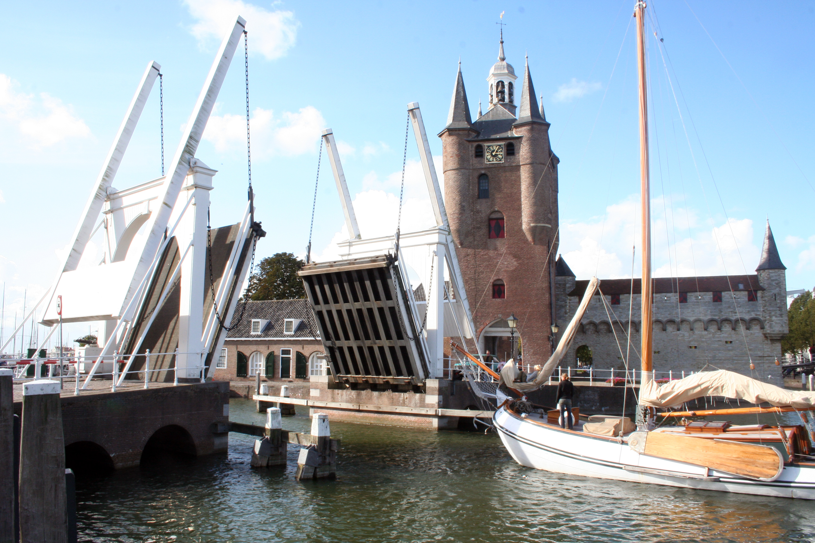 Hebebrücke in Zierikzee